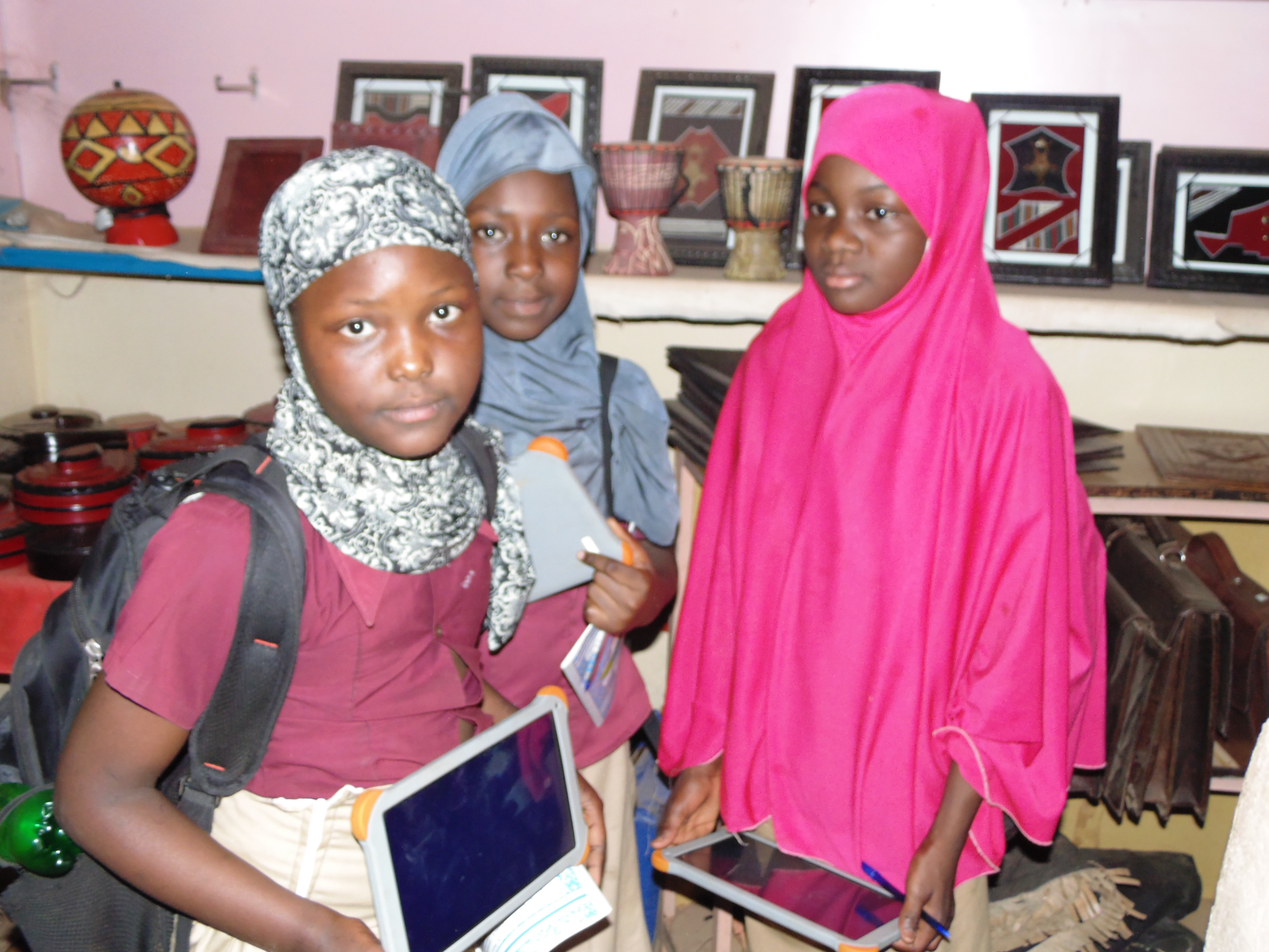 Wikichallenge 2019